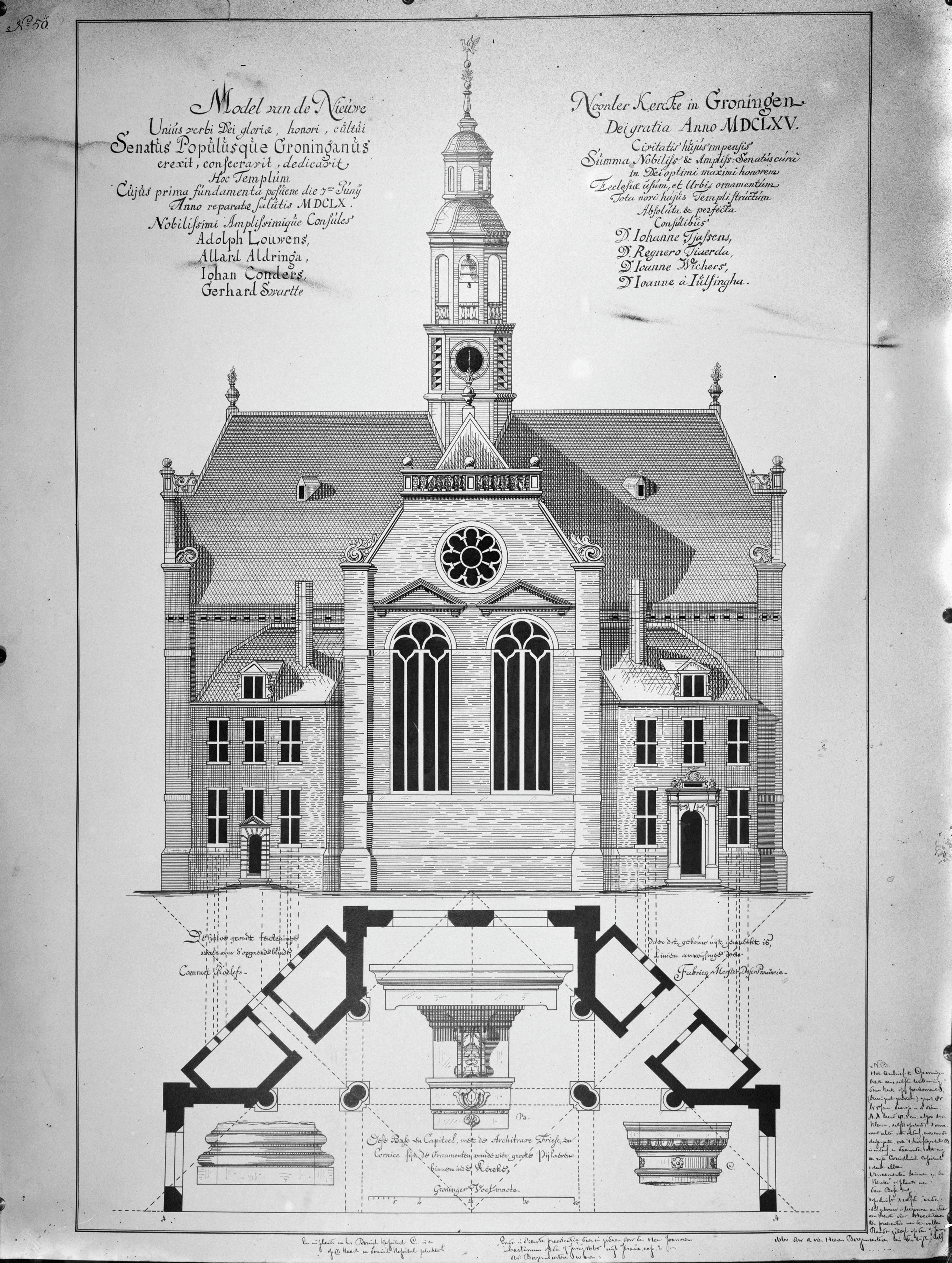 Noorderkerk of Nieuwe Kerk: naar ontwerp van Coenr.Roelofs in het Gronings Museum